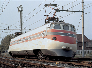 L'elettromotrice ferroviaria FIAT Y 0160, prototipo sperimentale di treno ad assetto variabile costruito dalla FIAT – Sezione Materiale Ferroviario nel 1971. È il prototipo di tutta la famiglia dei treni Pendolino.